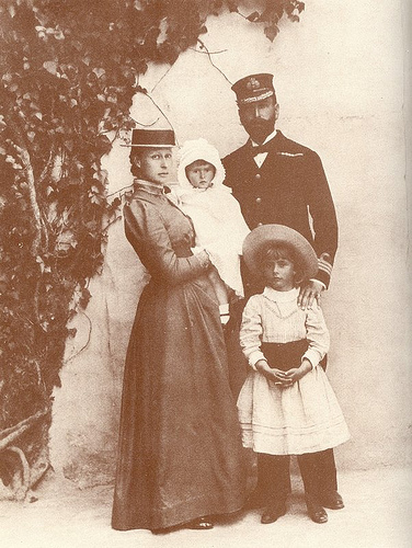 Louis Mountbatten, 1.º Marquês de Milford Haven, com a sua esposa Vitória e as duas filhas mais velhas, Alice e Luísa